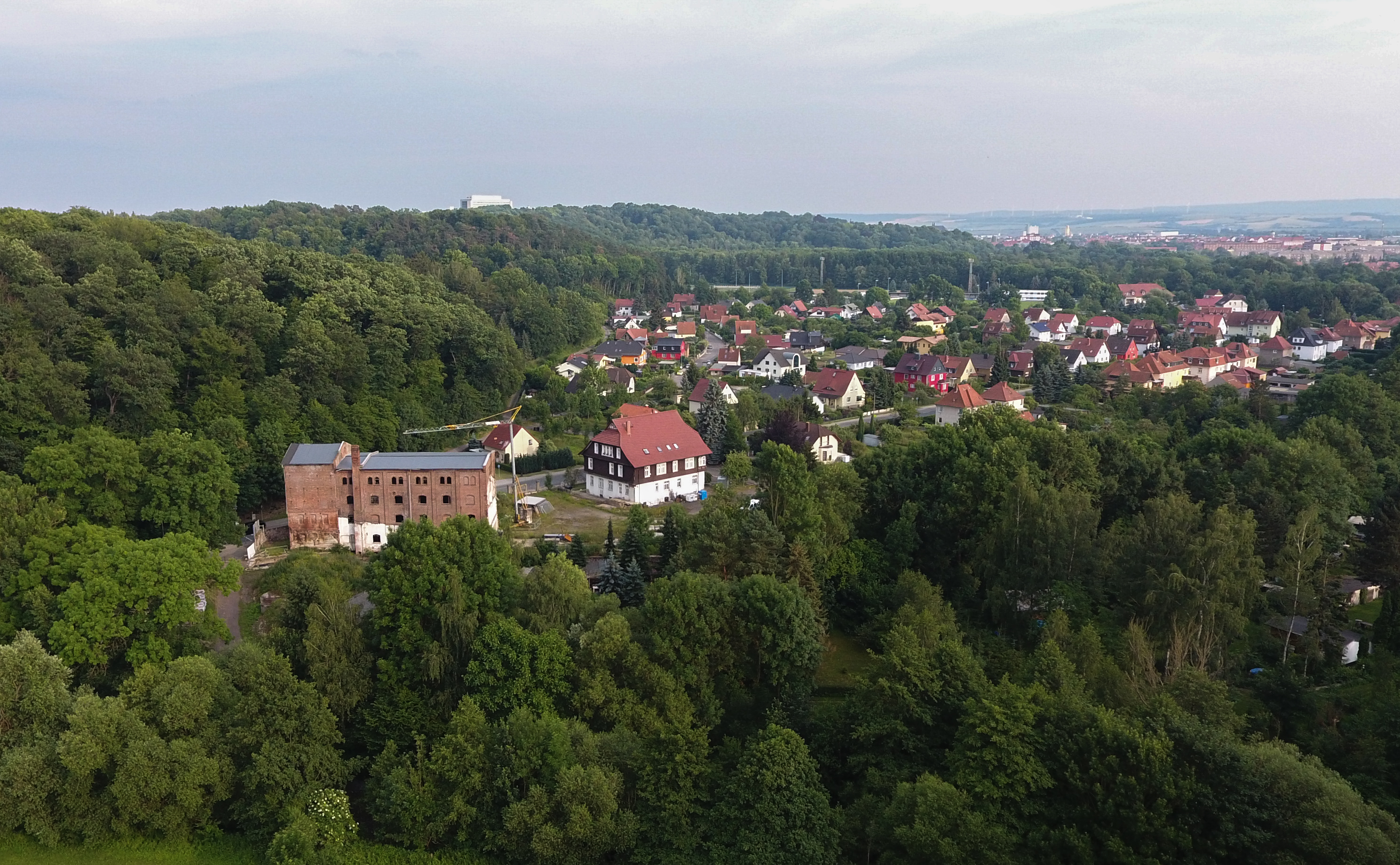 Die Ellermühle (links) mit Wohnhaus. Im Hintergrund die Eller-Siedlung (Klein-Krimderode)